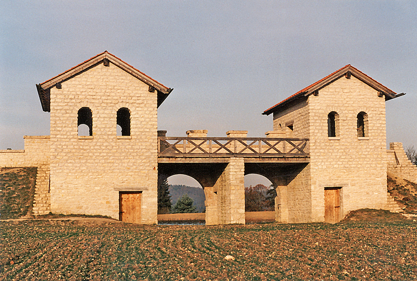 Kastel Pfünz, Bayern: Ein für die frühen 1990er Jahre idealtypischer Rekonstruktionsversuch der Porta praetoria auf den antiken Fundamenten. Blick vom Lagerinneren auf das Tor. Schon früh galt diese Rekonstruktion als veraltet. Sie ist um ein Stockwerk zu niedrig. Zustand im Januar 1993.